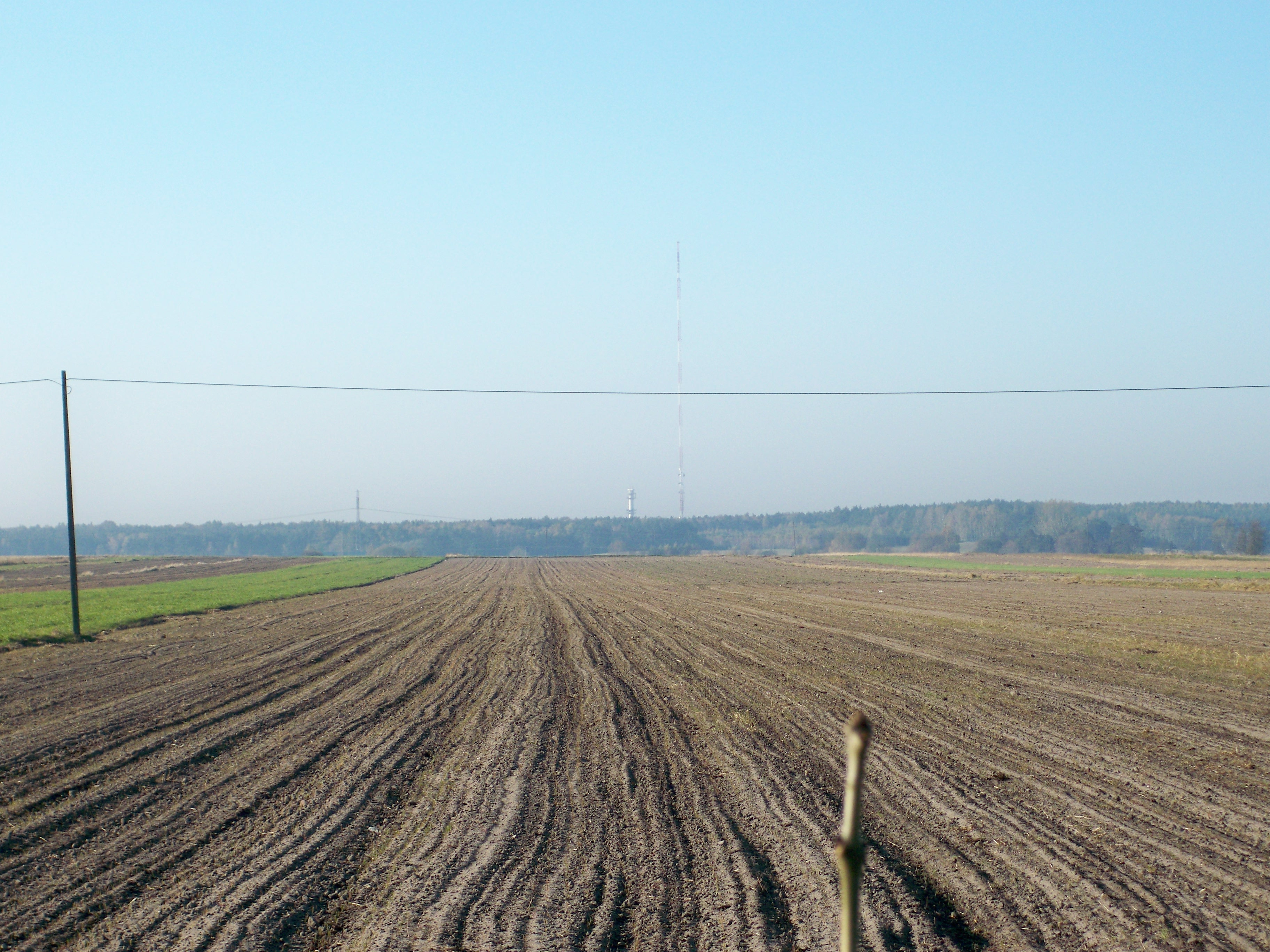 Zygry (gm. Zadzim, pow. poddębicki, woj. łódzkie, Polska).